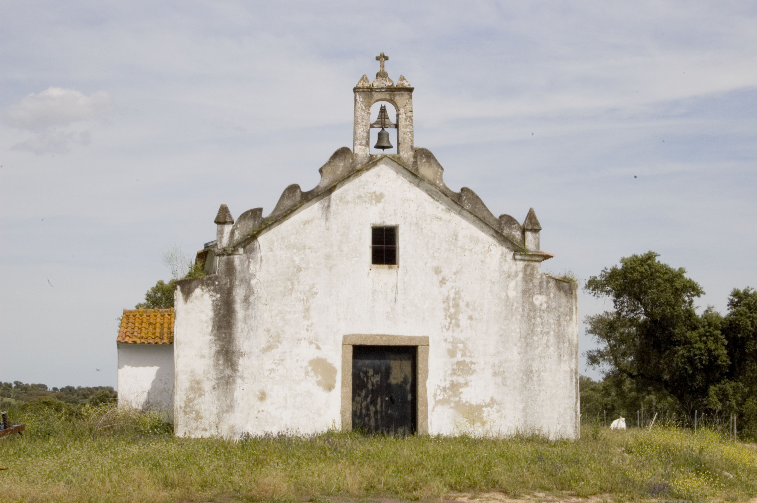 Ermida de S. Sebastião, by Torre das Aguias